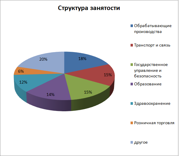 Структура занятости в различных отраслях экономики Вологды в 2009